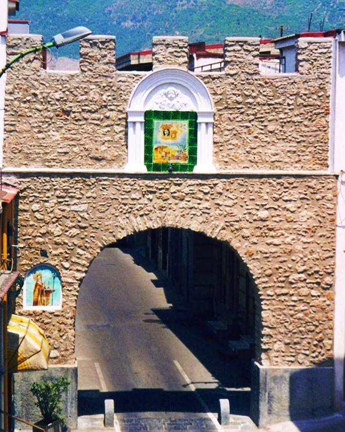 Porta civica di San Nicola a Striano (Napoli), risalente al XVI secolo